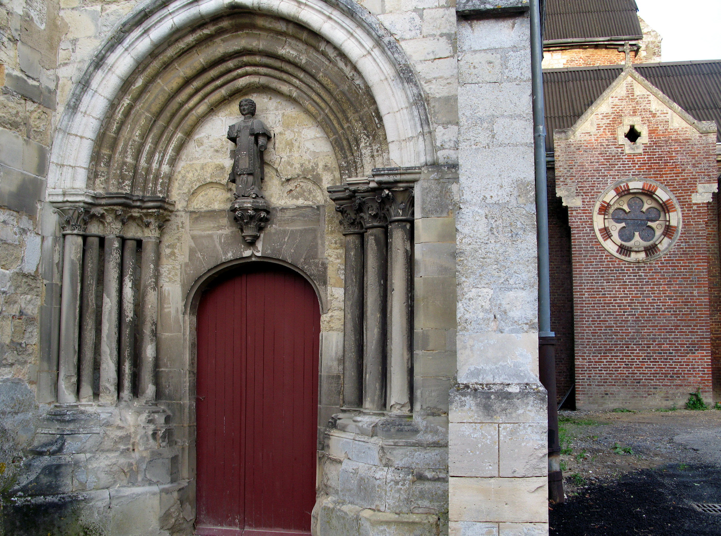 Rozoy-sur-Serre (Aisne, France) - Le portail de droite (façade ouest) de l'église fortifiée.